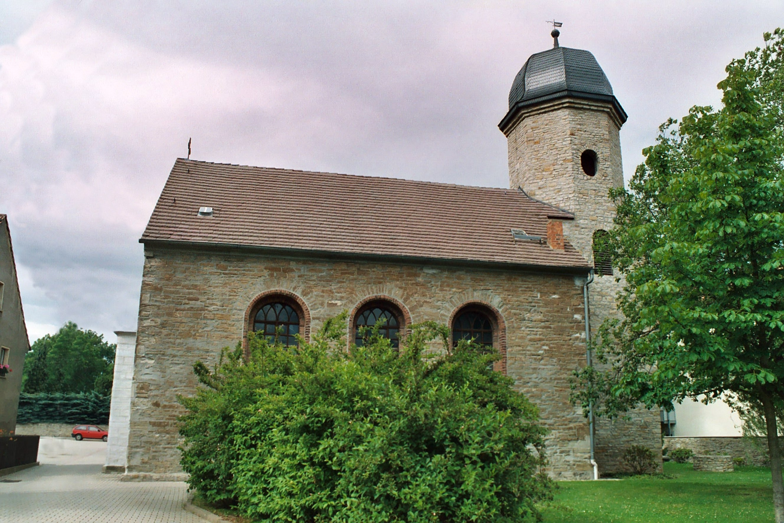 Dorfkirche Geußnitz; Traukirche der Eltern von Robert Schumann; Geußnitz ist Ortsteil von Zeitz, Kirche liegt an der Zeitzer Straße